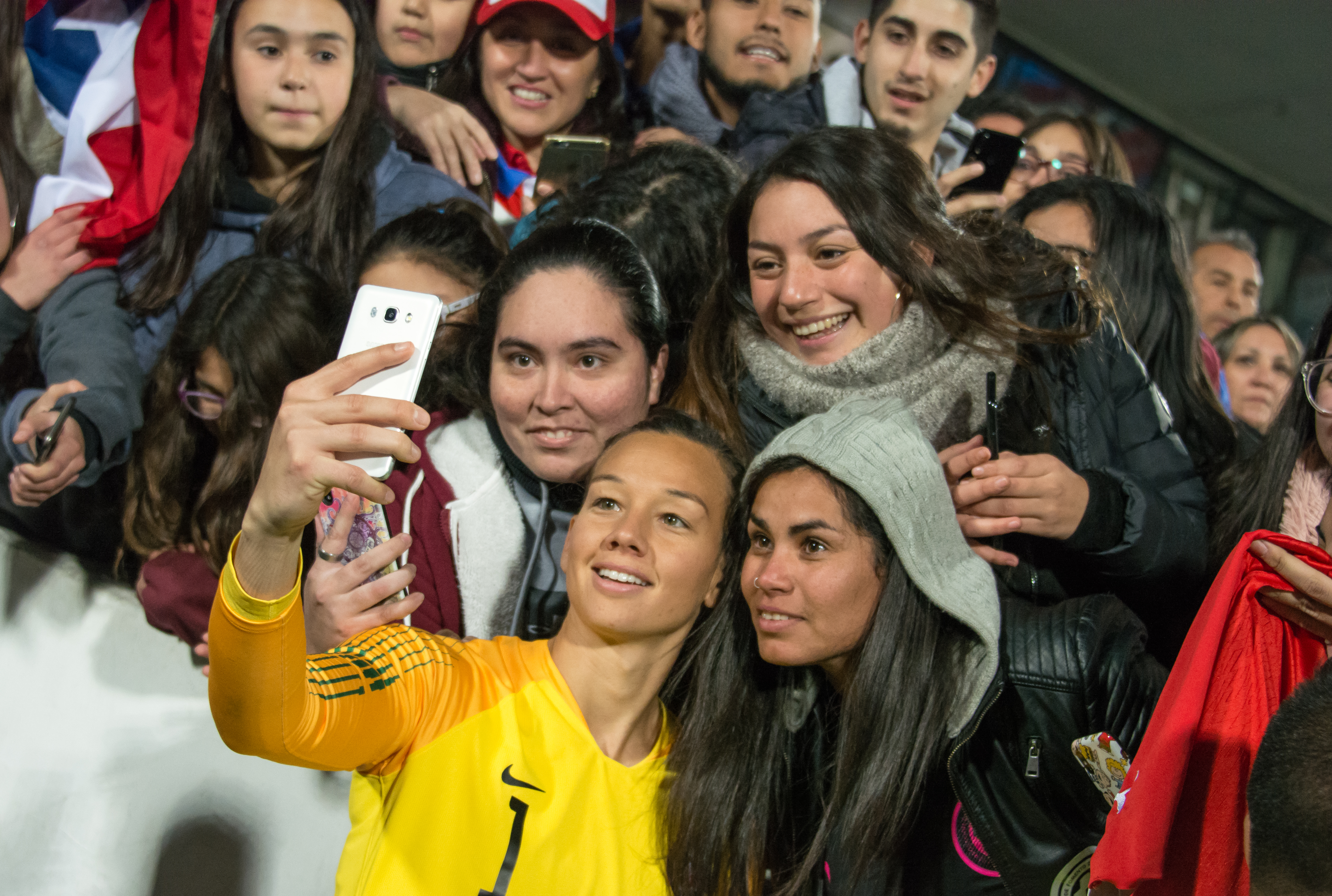 Christiane Endler, Chile v Colombia, Estadio Nacional, Ñuñoa, Santiago, Chile.